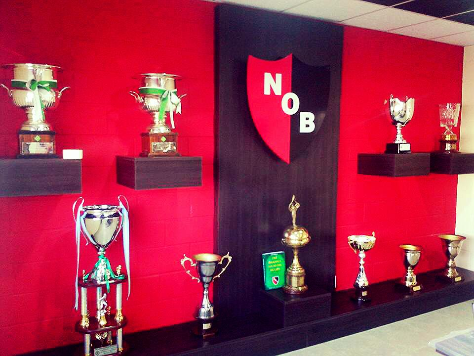 Copas obtenidas por NOB Laguna Larga